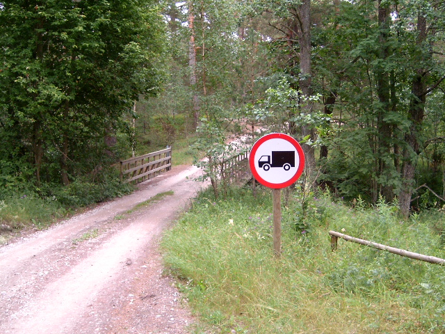 Geen vrachtwagens